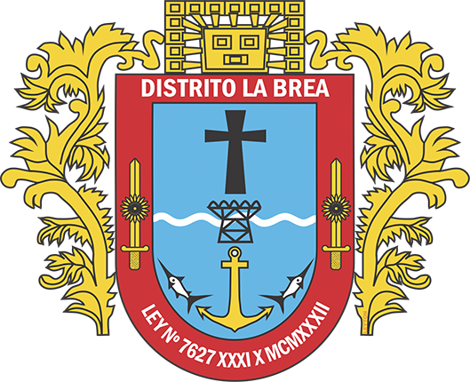 Escudo La Brea